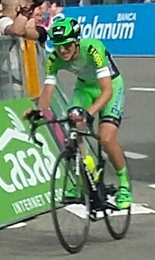 Giulio Ciccone al suo arrivo a Sestola, 10° tappa del Giro d'Italia 2016